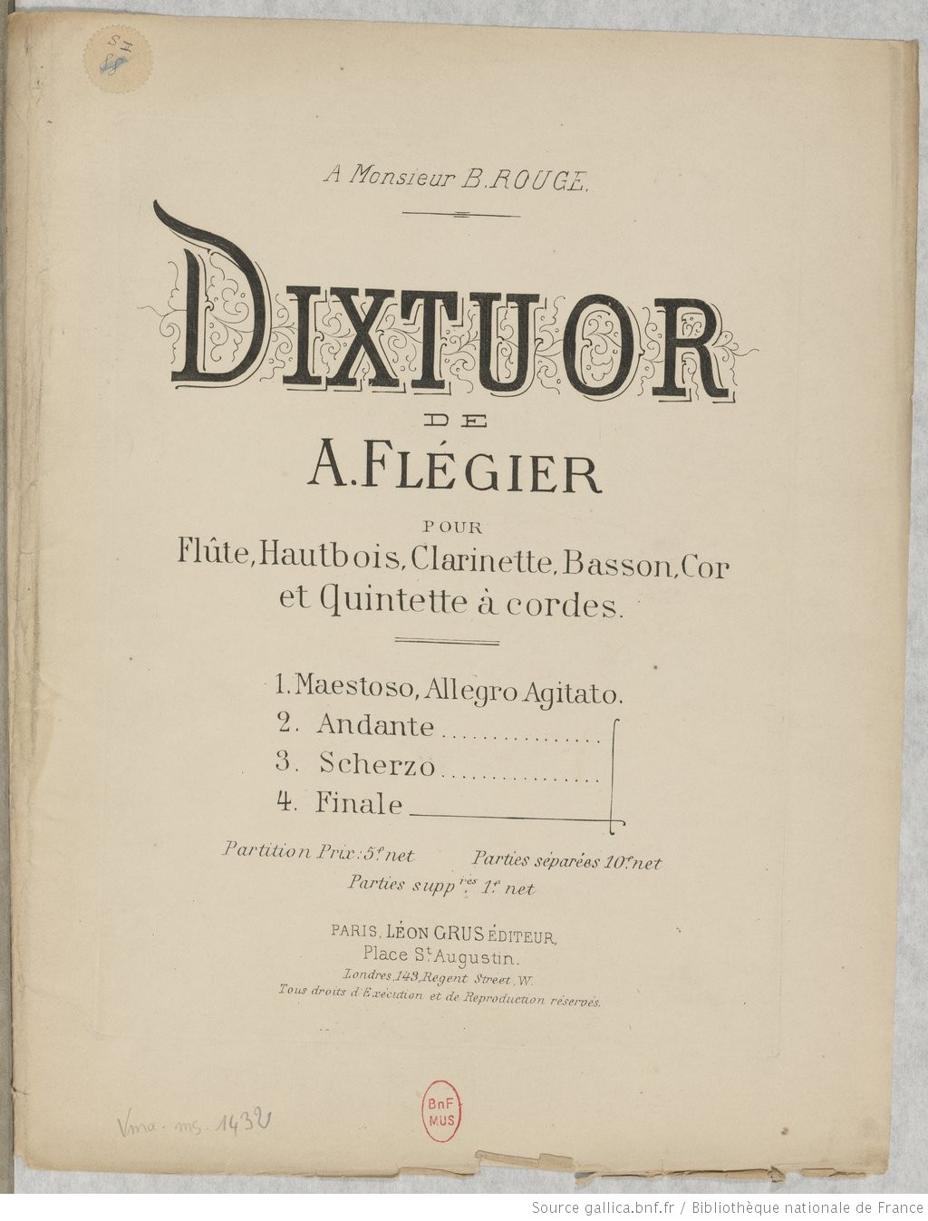 page de titre du "Dixtuor" d'Ange Flégier, édition originale Léon Grus, ca. 1899